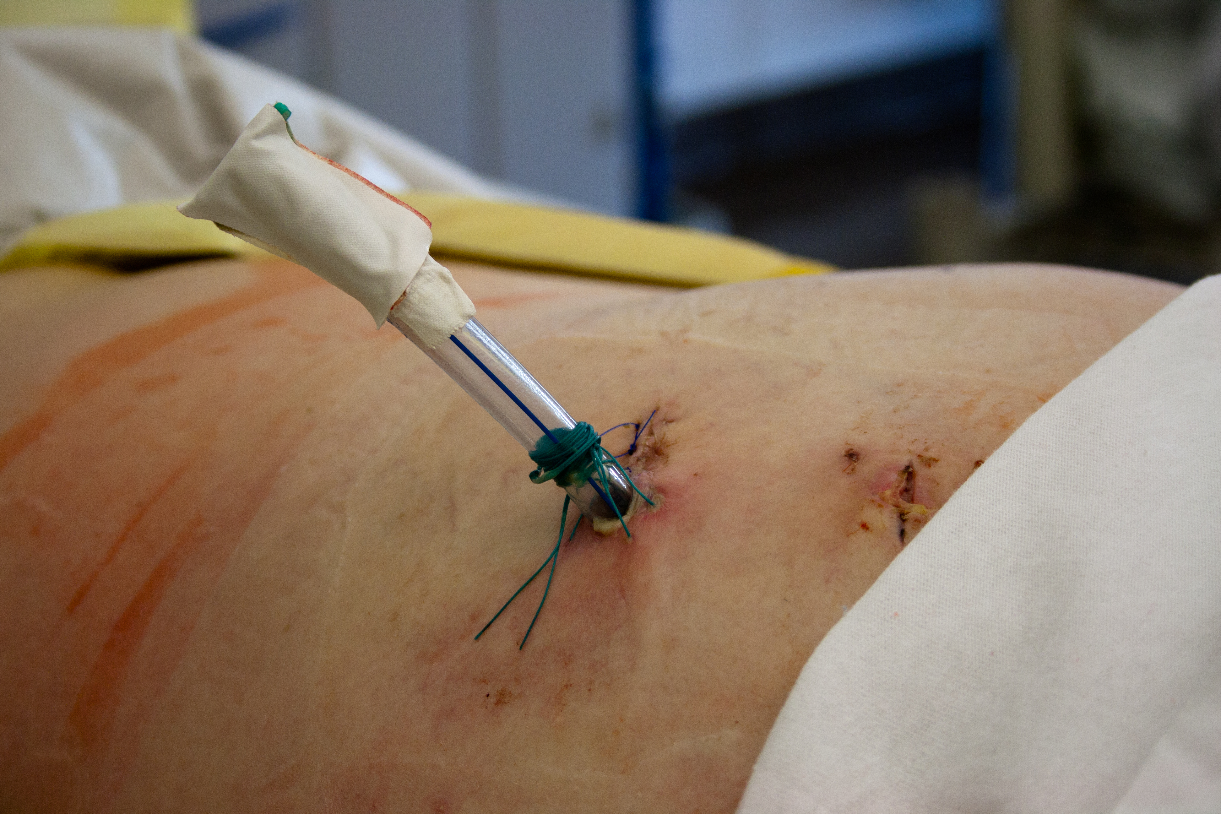 Abgeklemmte Thoraxsaugdrainage links